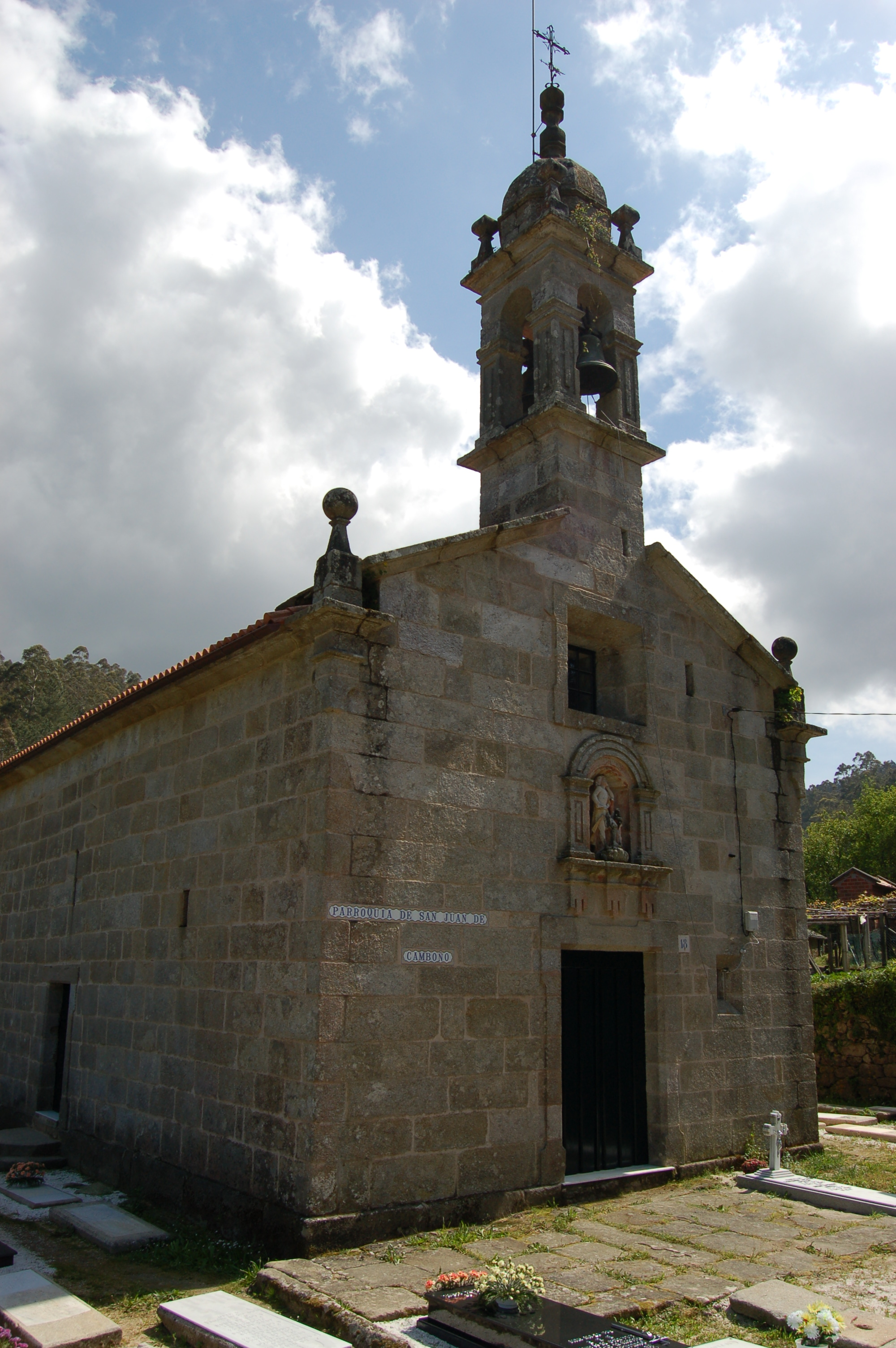 Igrexa parroquial de San Xoán de Camboño (Lousame).